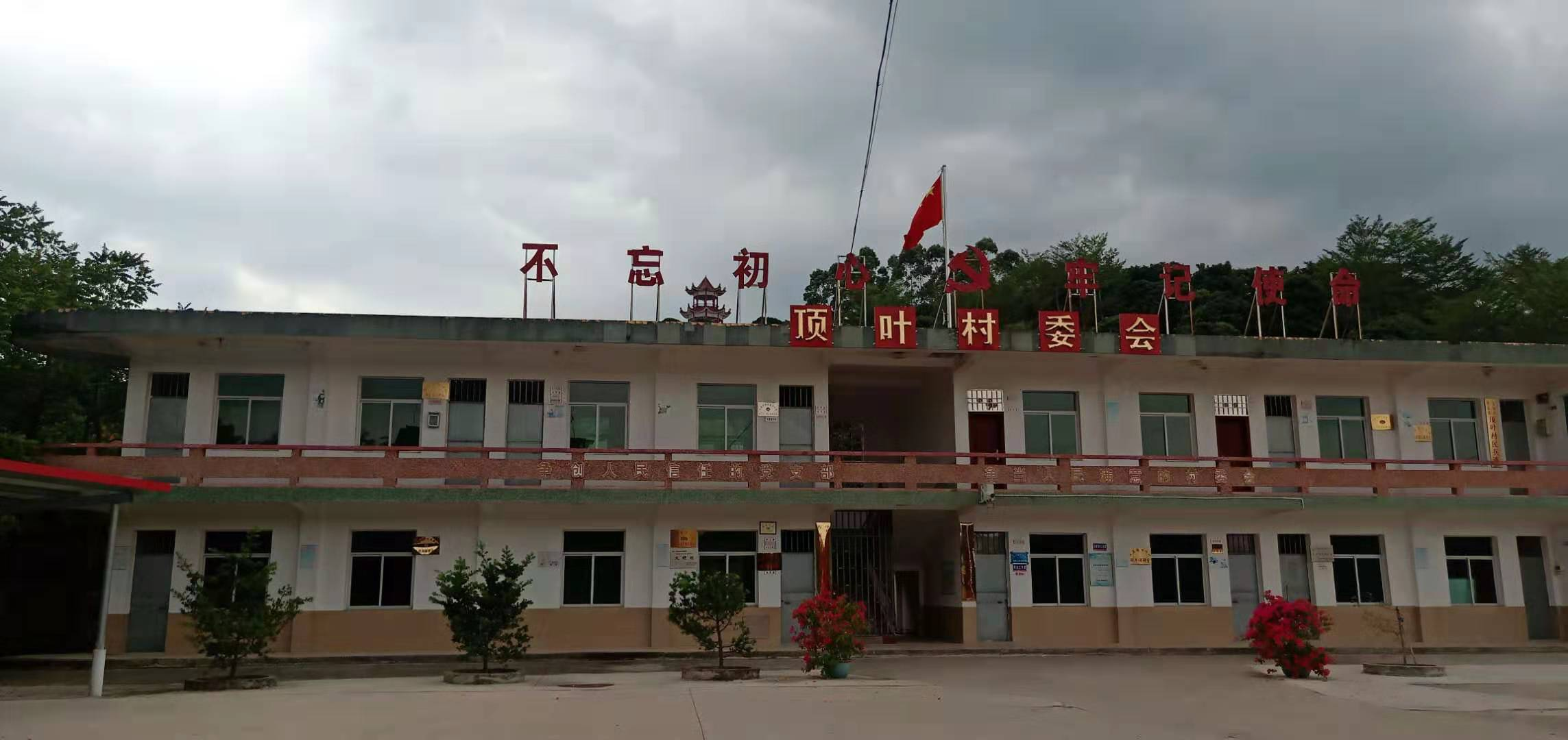 中文（中国大陆）: 程溪镇顶叶村